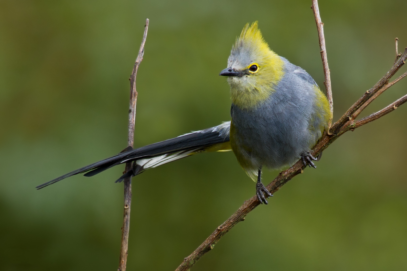 Endemic from Costa Rica and Panama, Cerro de la Muerte, Costa Rica